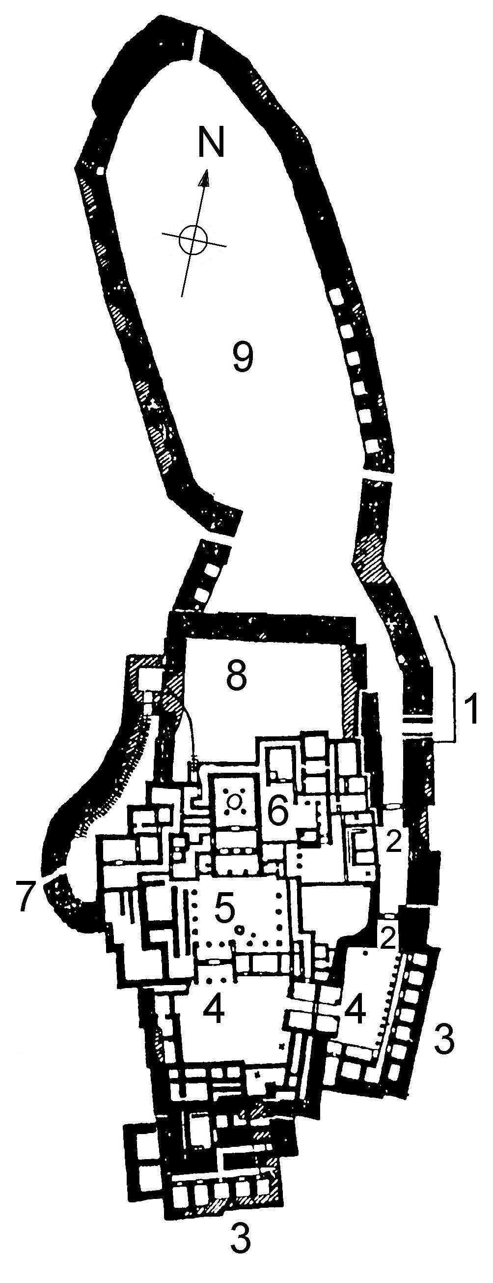 eigen werktekening nl: Plattegrond van de burcht van Tiryns. [1] Hellende toegangsweg - [2] Vestingpoorten - [3] Kazematten - [4] Hofpoorten - [5] Centrale paleisplein - [6] Woonhuis ("Megaron") en aanpalende gebouwen - [7] Uitvalspoort - [8] Middenburcht - [9] Benedenburcht (vluchtburcht) en: Floor plan of Tiryns Castle. [1] Sloping access road - [2] Fortress gates - [3] Casemates - [4] Hofpoorten - [5] Central Palace Square - [6] House ("Megaron") and adjoining buildings - [7] Exit gate - [8] Middenburcht - [9] Lower castle (flight castle)